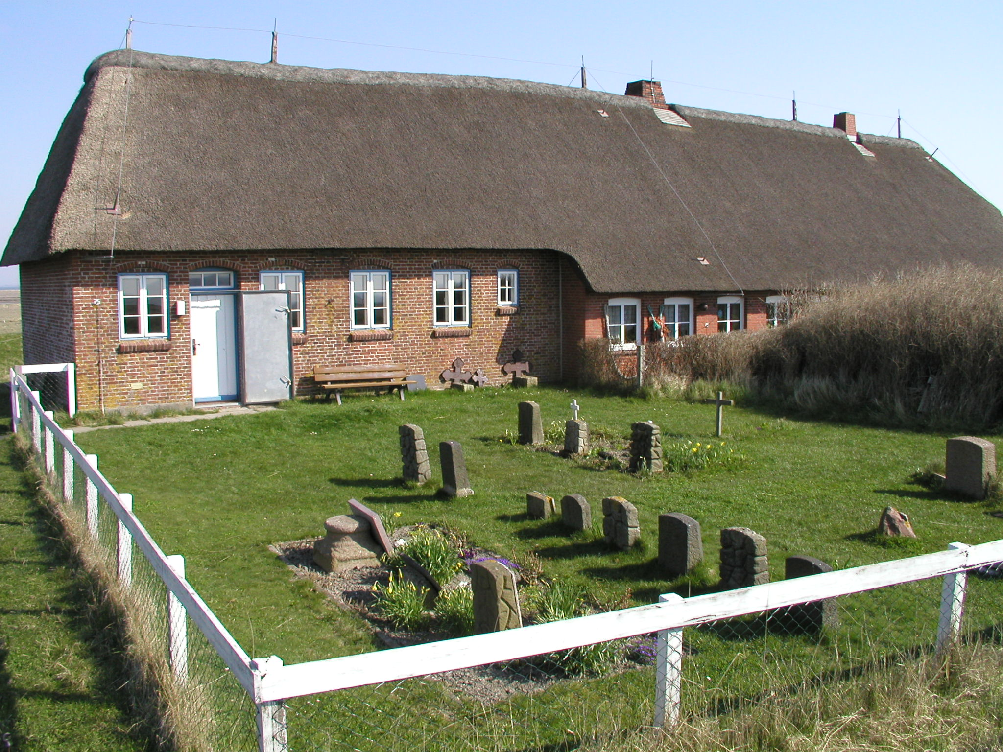 Hallig Gröde Friedhof, Kirche(links) und Schule(rechts)